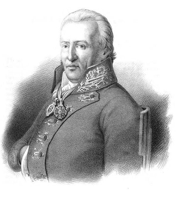 Sven Anders Hedin (1750-1821)